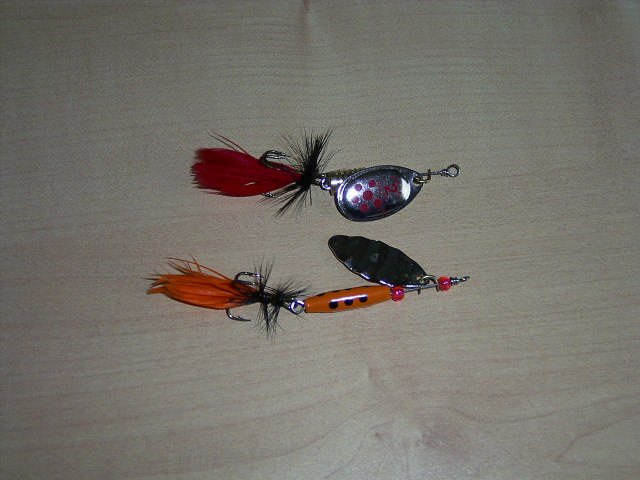 Spinner (Angelköder)